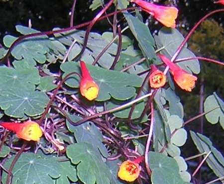 Tropaeolum tuberosum, capucine tubereuse (Jardin du Thabor à Rennes en France)